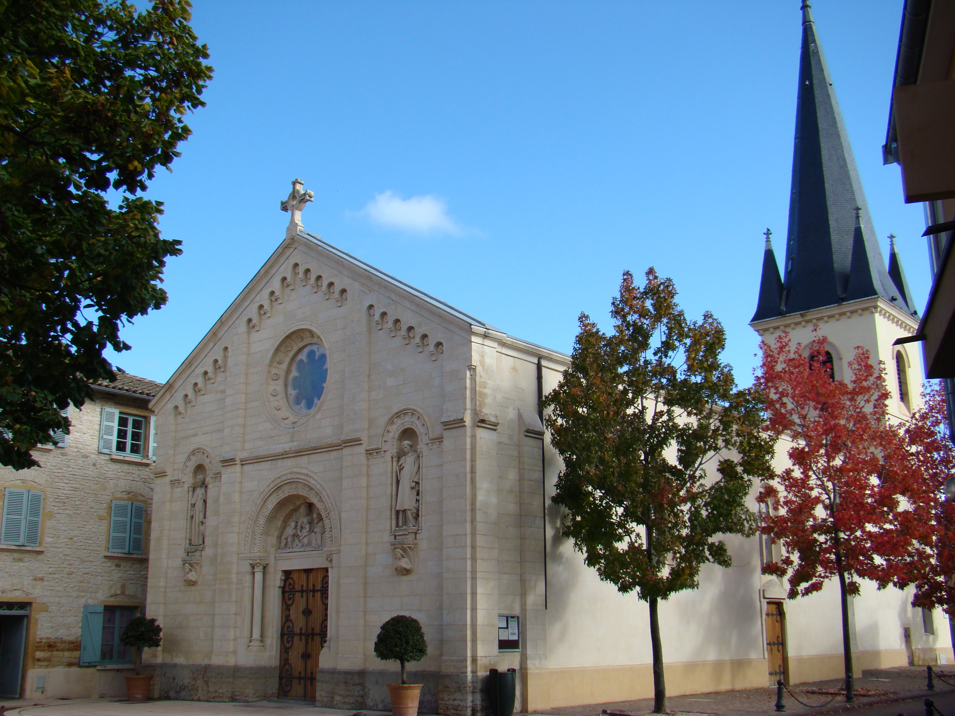 L'église de Gleizé et son clocher.